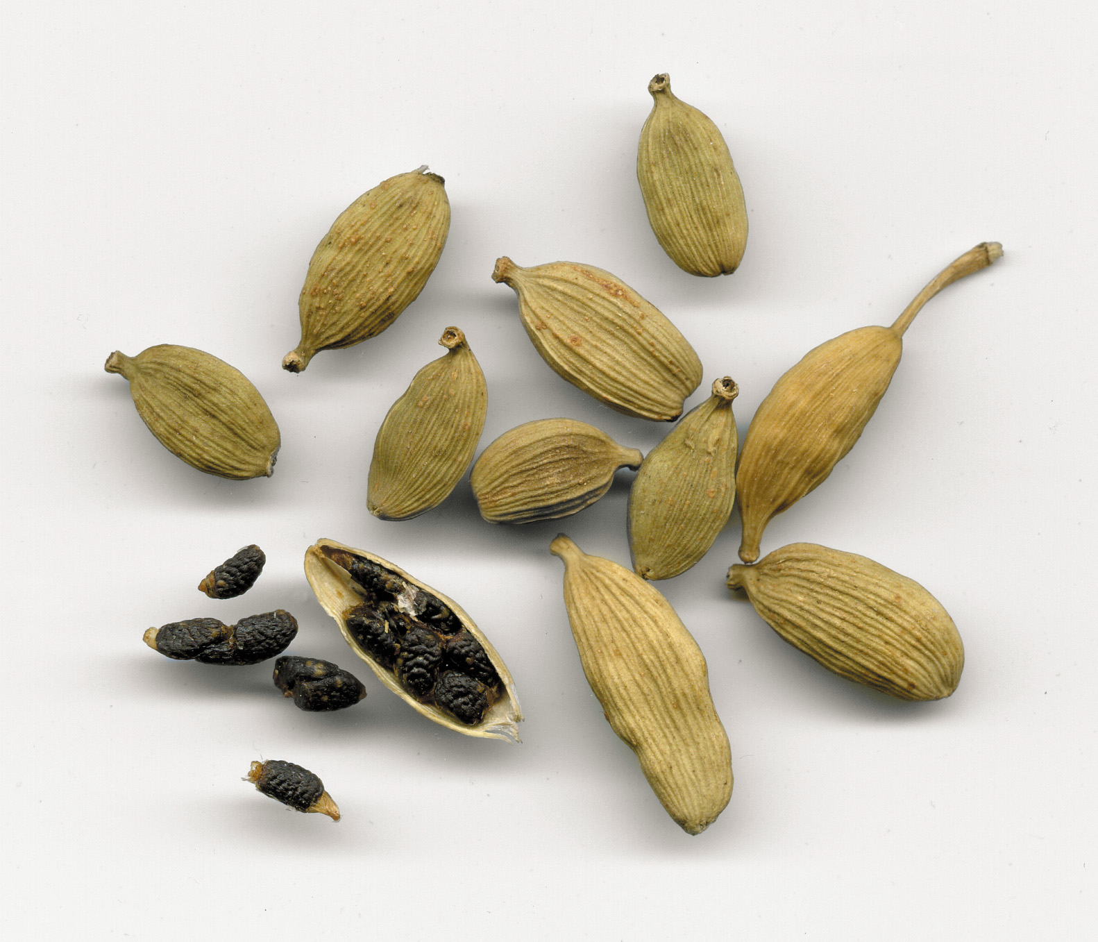 Kardamomkapseln